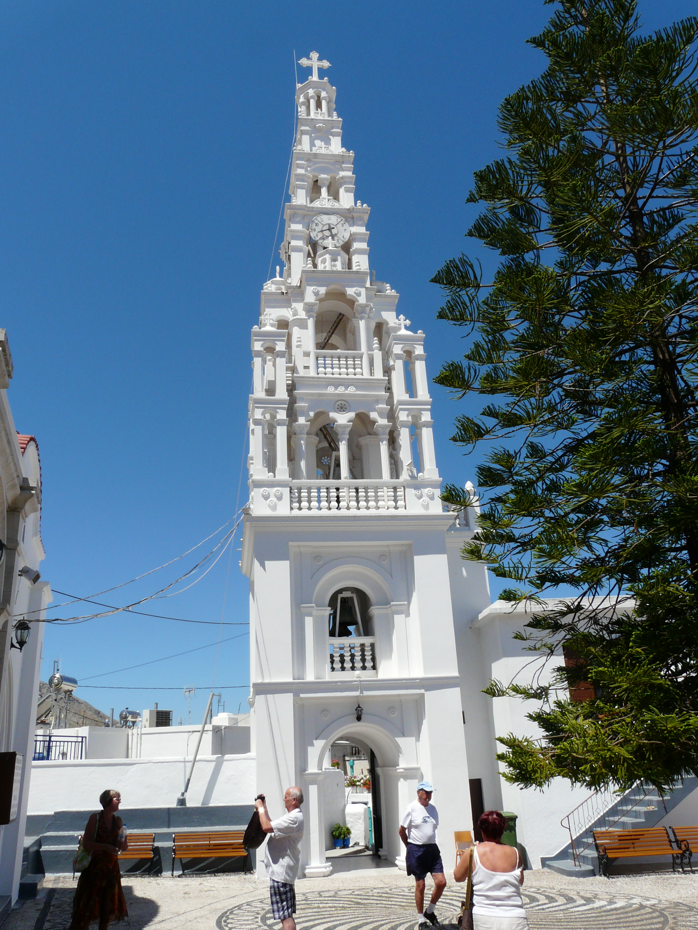 Archangelos (Rhodes). Saint Micheal Archangel Church